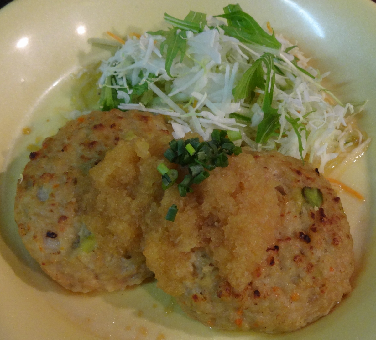 Tofu-Hamburg steak (豆腐ハンバーグ)